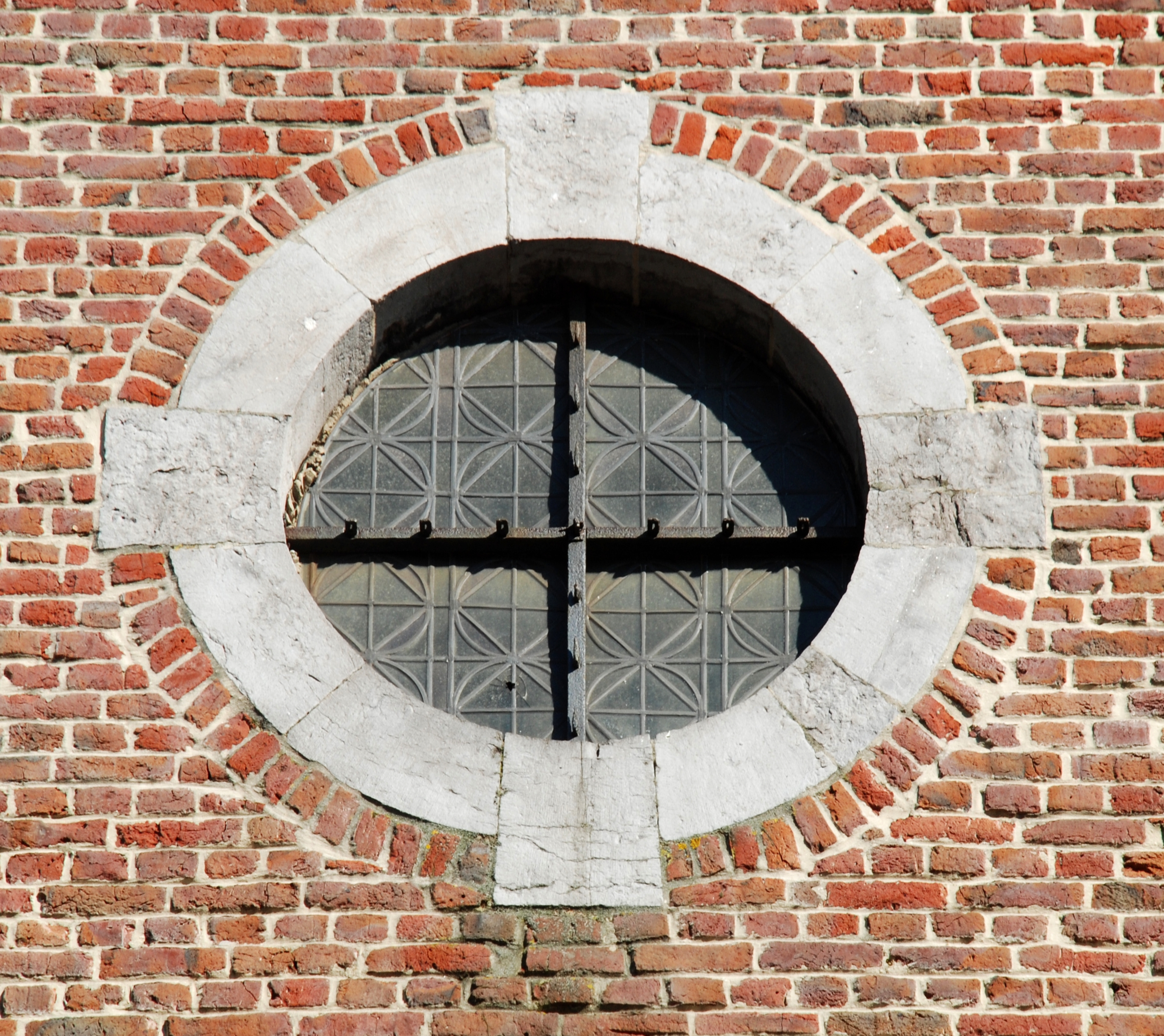 Belgique - Brabant wallon - Ottignies - Église Saint-Rémi